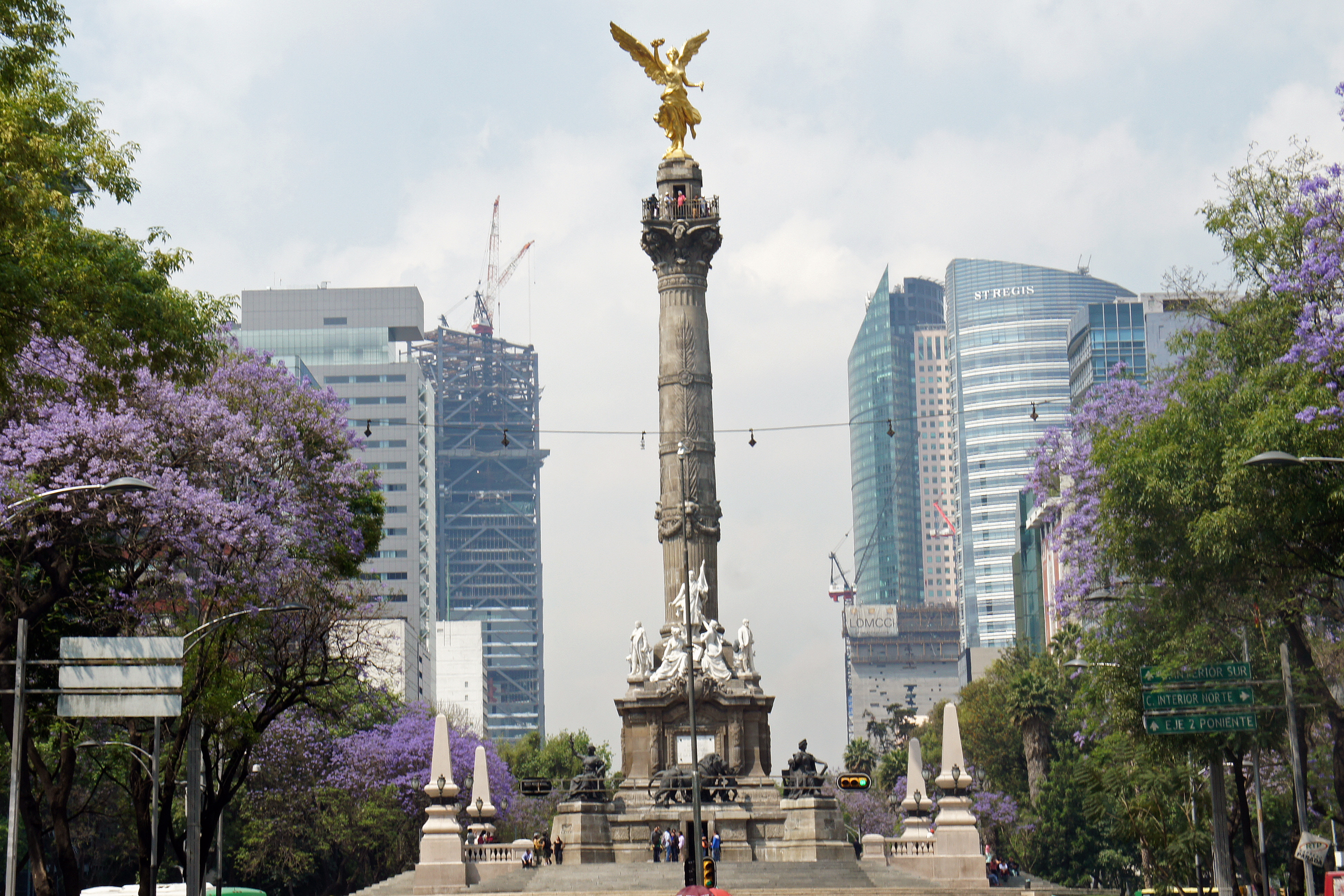 Monumento de la Independencia (El Angel), Paseo de la Reforma, Ciudad de México, DF.